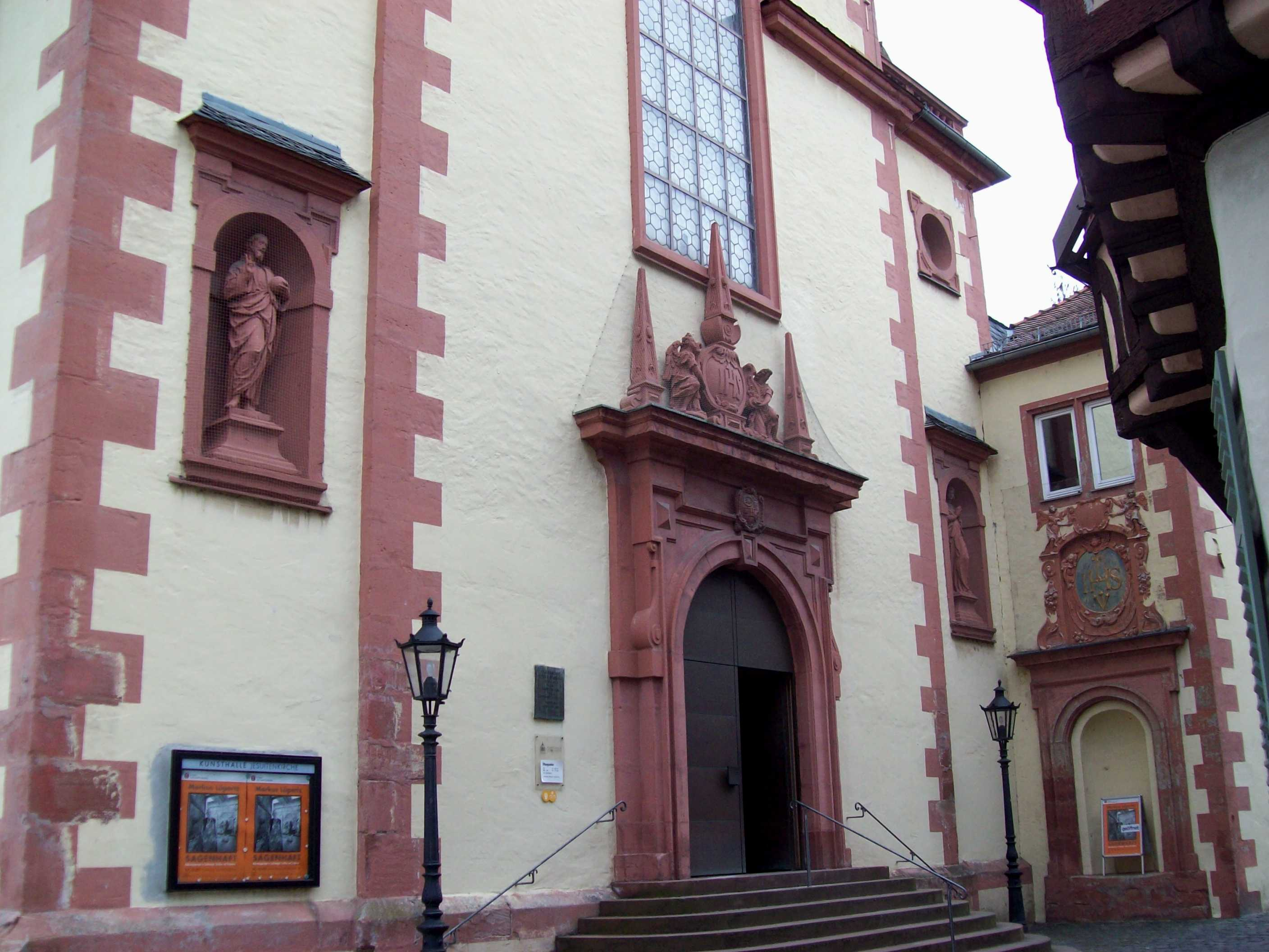 Jesuitenkirche Aschaffenburg erbaut 1619-1621 heute Kunsthalle Eingang